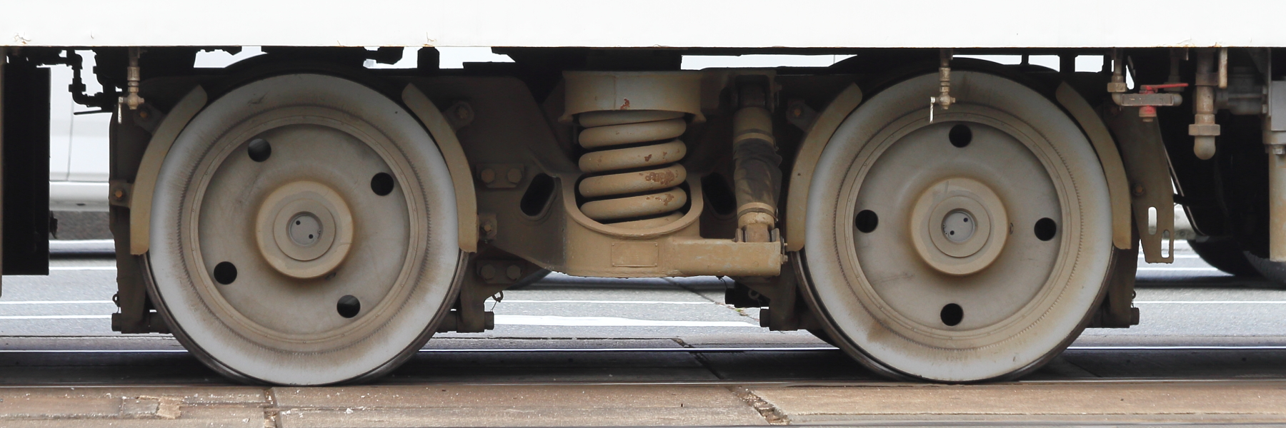 8200形8201号の付随台車（日本車輌製造製NS-19）。